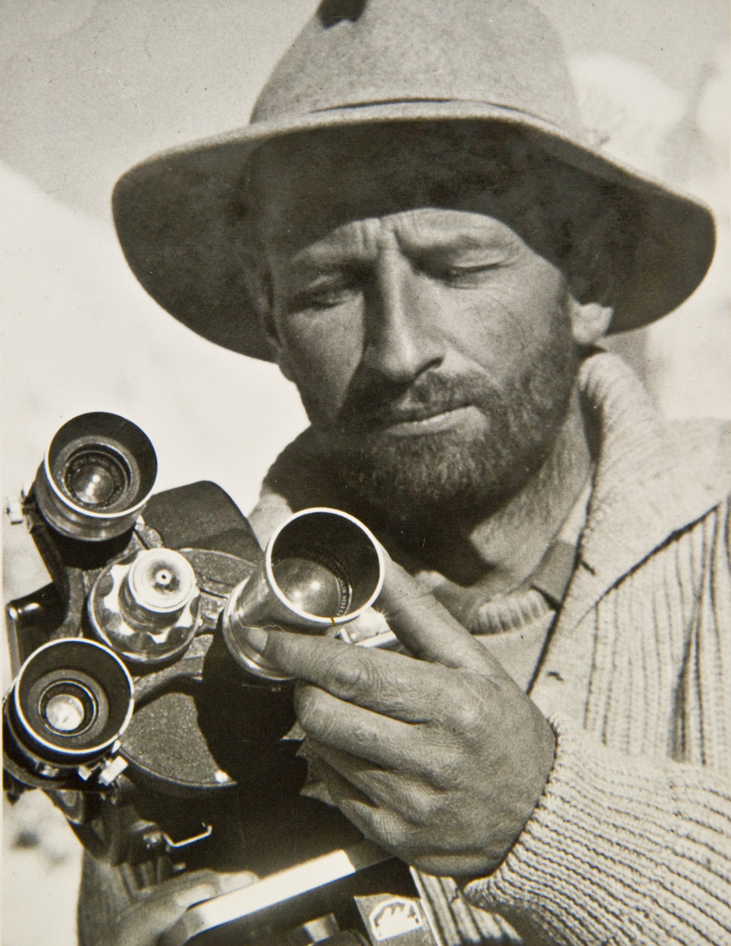 Portrait Gerhard Klammet, Selbstauslöser, Himalaya-Expedition